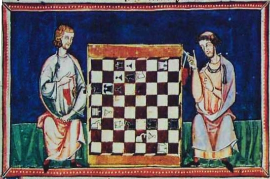 Chess problem #35 from the Libro de los juegos. Folio 27 verso.